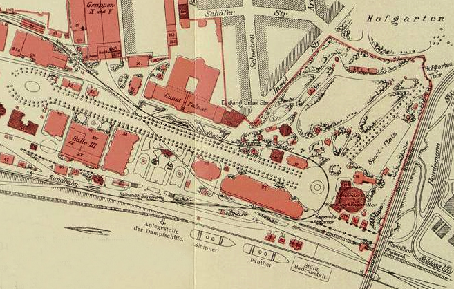 Ausschnitt aus Industrie-Gewerbe & Kunst-Ausstellung, Lageplan, Düsseldorf 1902 mit Kunstausstellungspalast (Nr. 32) und Kunstausstellung-Restaurant (Nr. 31, dunkelrot schraffiert)